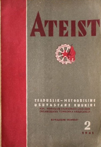 1941 aasta usuvastane ajakiri